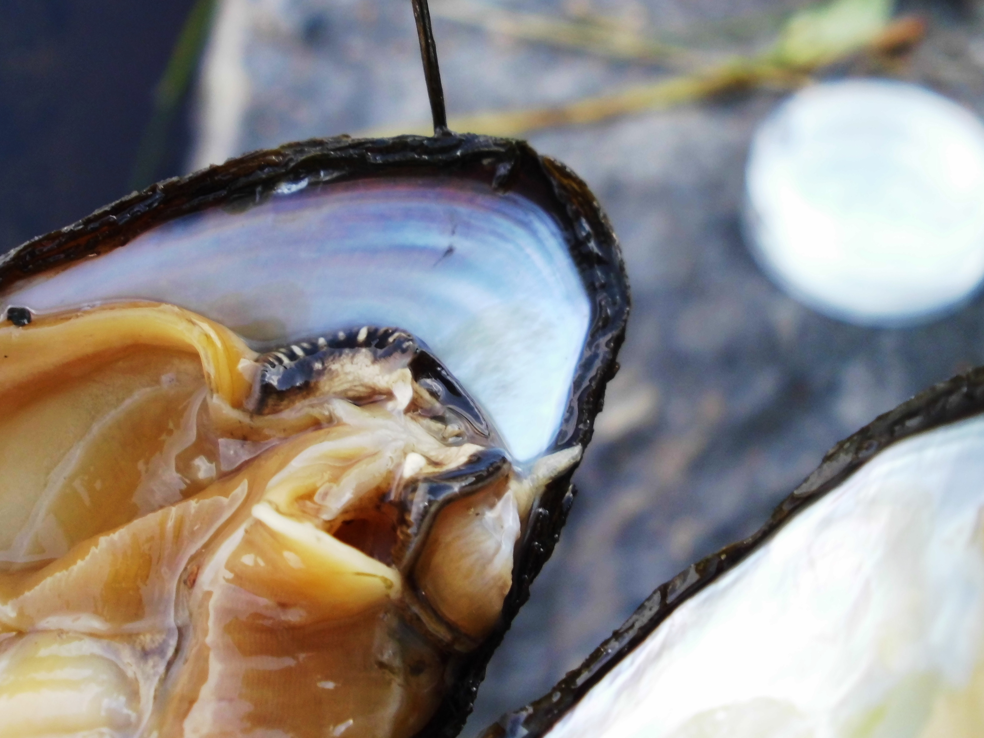 Перловица обыкновенная. Раковина вскрыта, тело моллюска слегка повреждено. Перелиавающийся разными цветами внутренний перламутровый слой раковины. Верхнеуфалейский пруд на реке Уфалейка, бассейн реки Уфа.